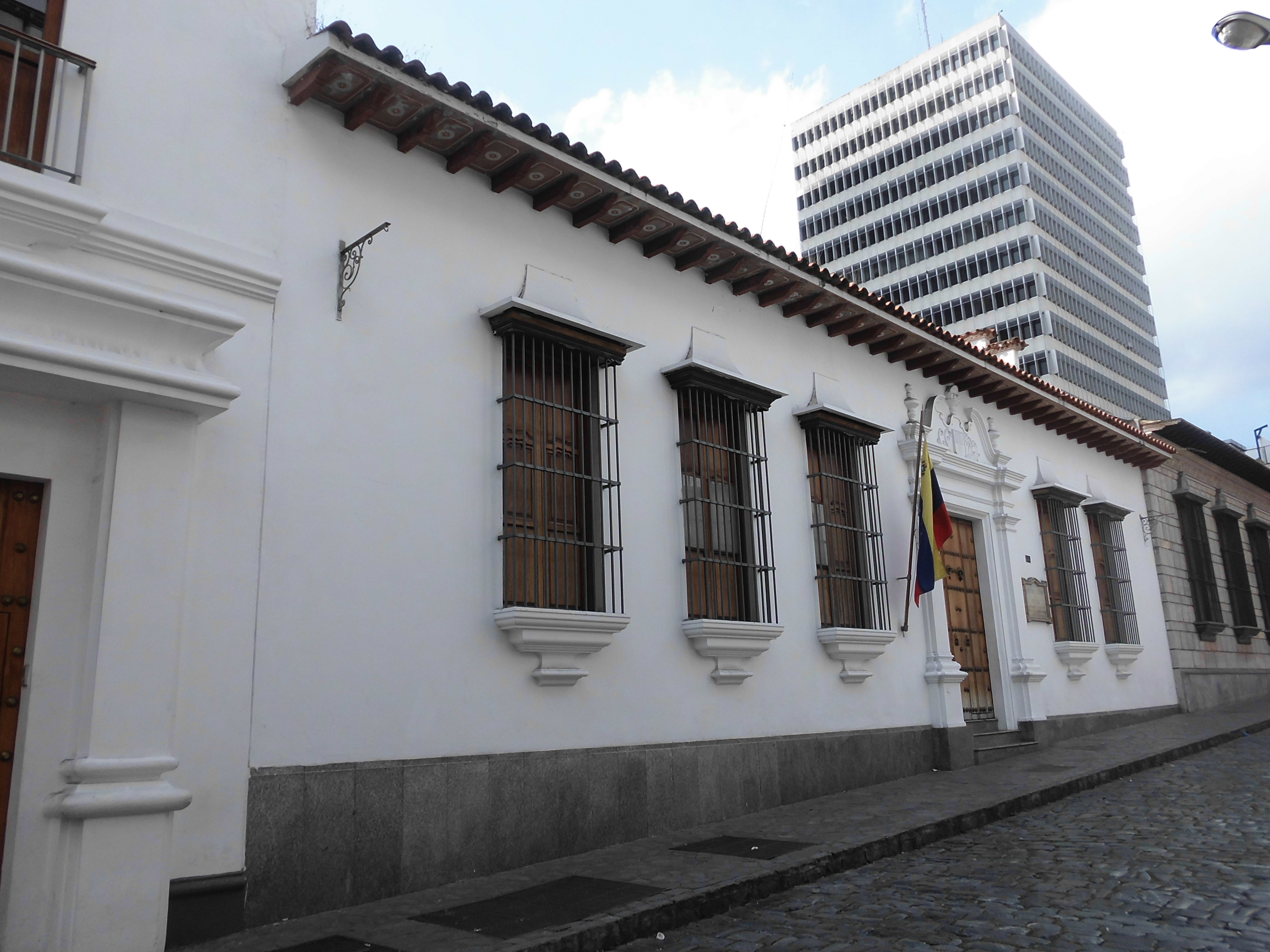 Fachada de la Sociedad Bolivariana, al lado de la casa natal del Libertador de América, Caracas-Venezuela.